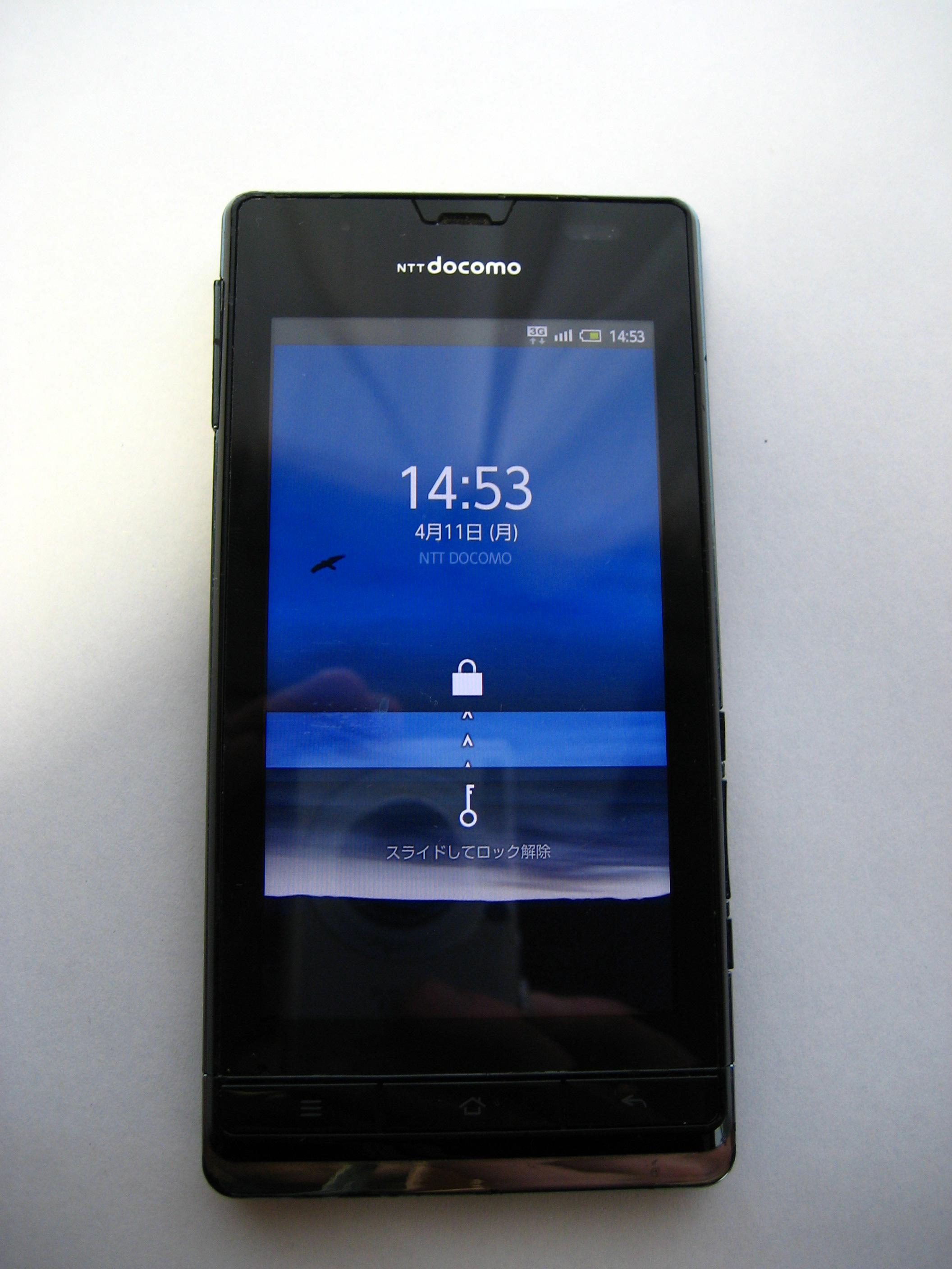 sh-13c ブラック